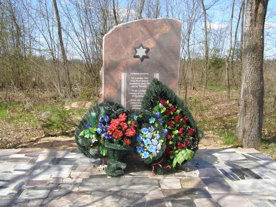 Памятник евреям поселка Заславль Минского района, убитым во время Холокоста.